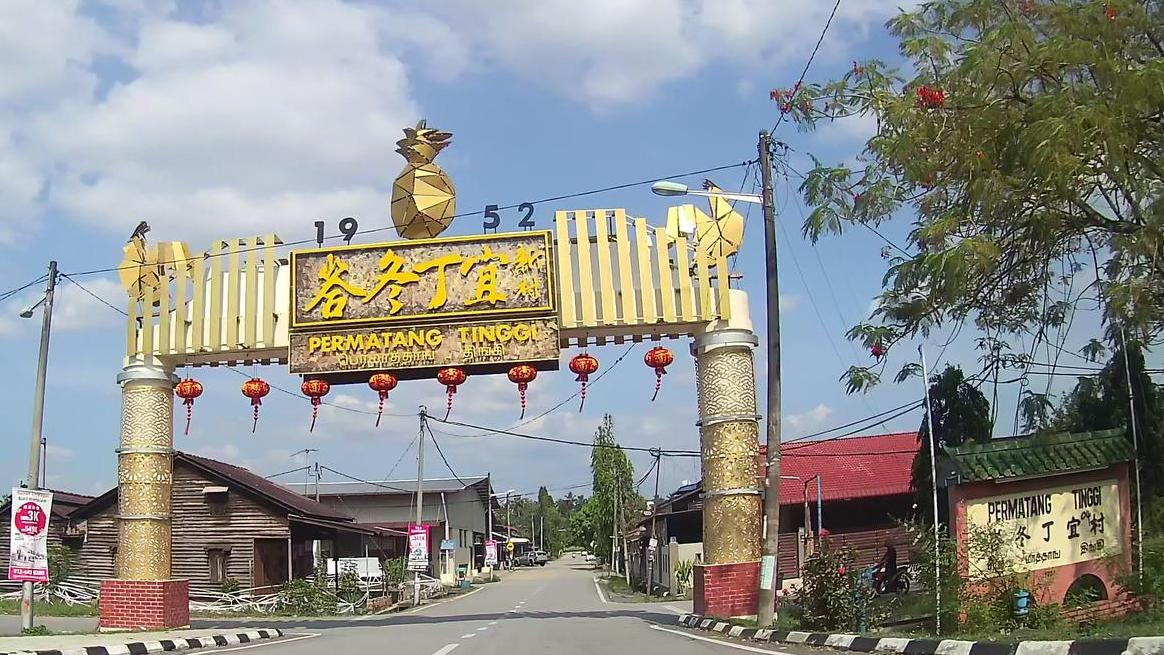 Permatang Tinggi